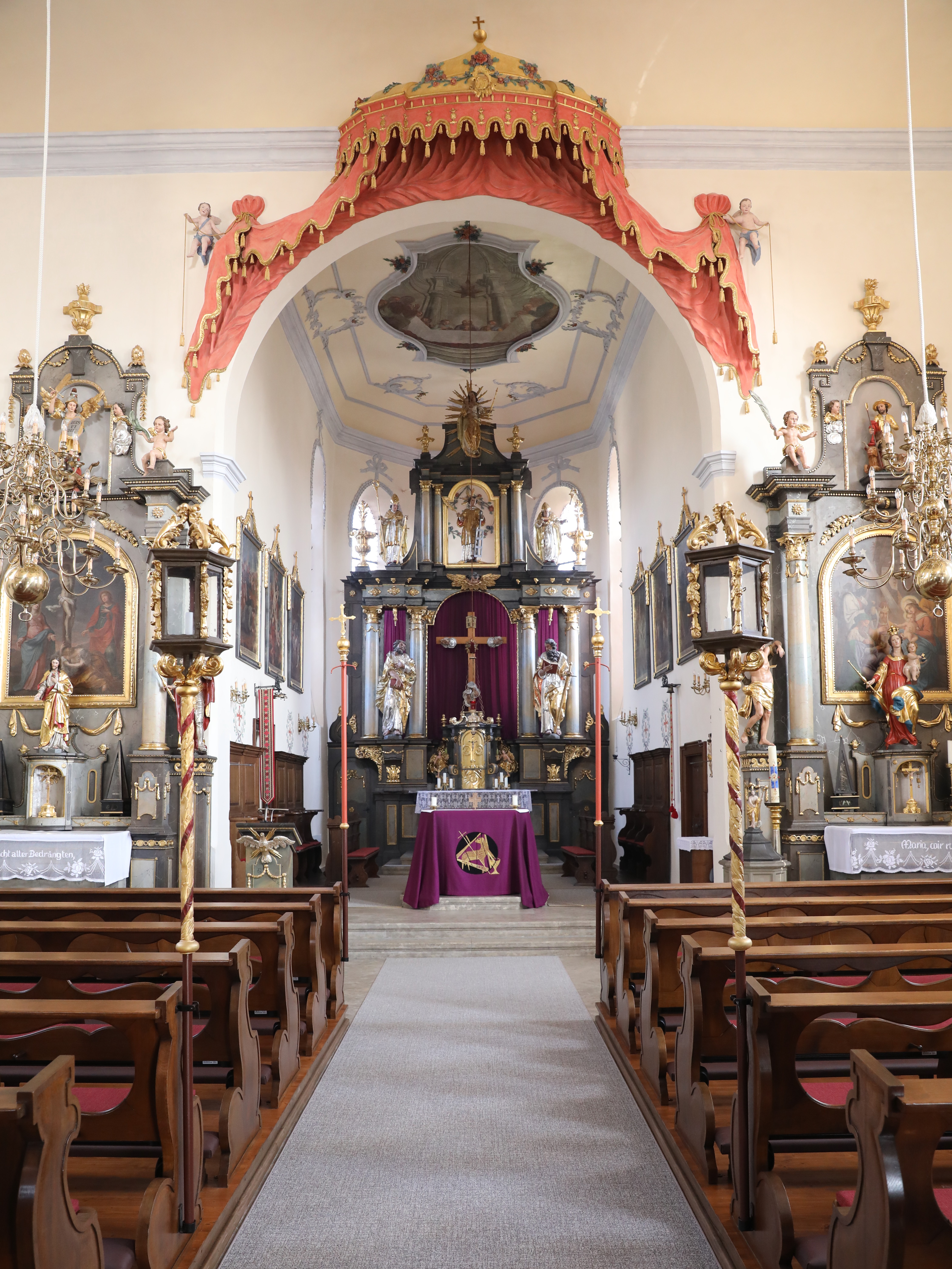 Altenbanz, St. Laurentius (Altenbanz)